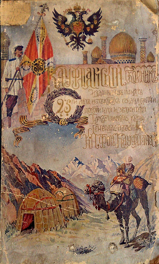 Обложка книги Кауфманский сборник